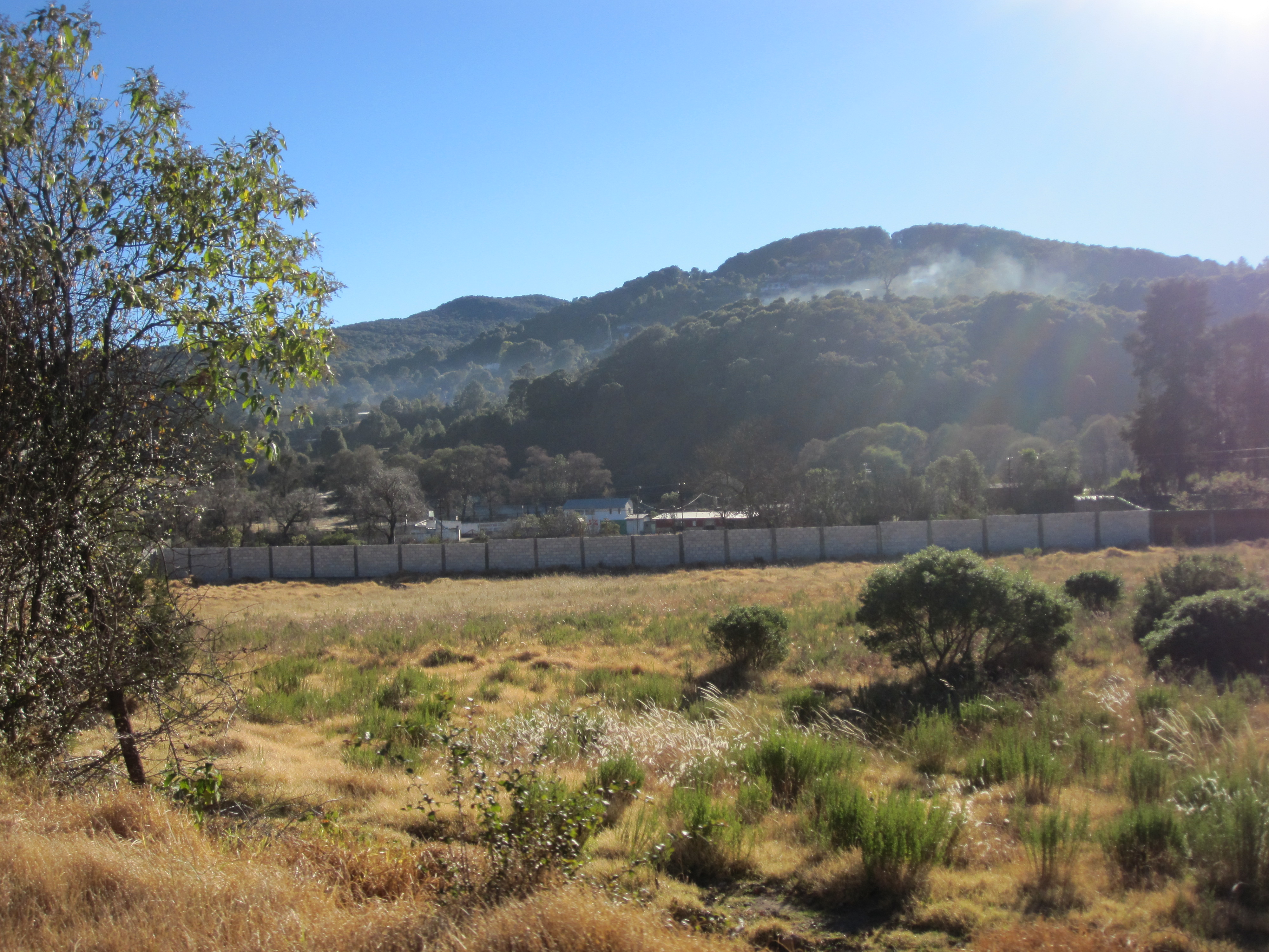 esta es una imagen del camino rumbo a Zacualtipan de Angeles Hidalgo.